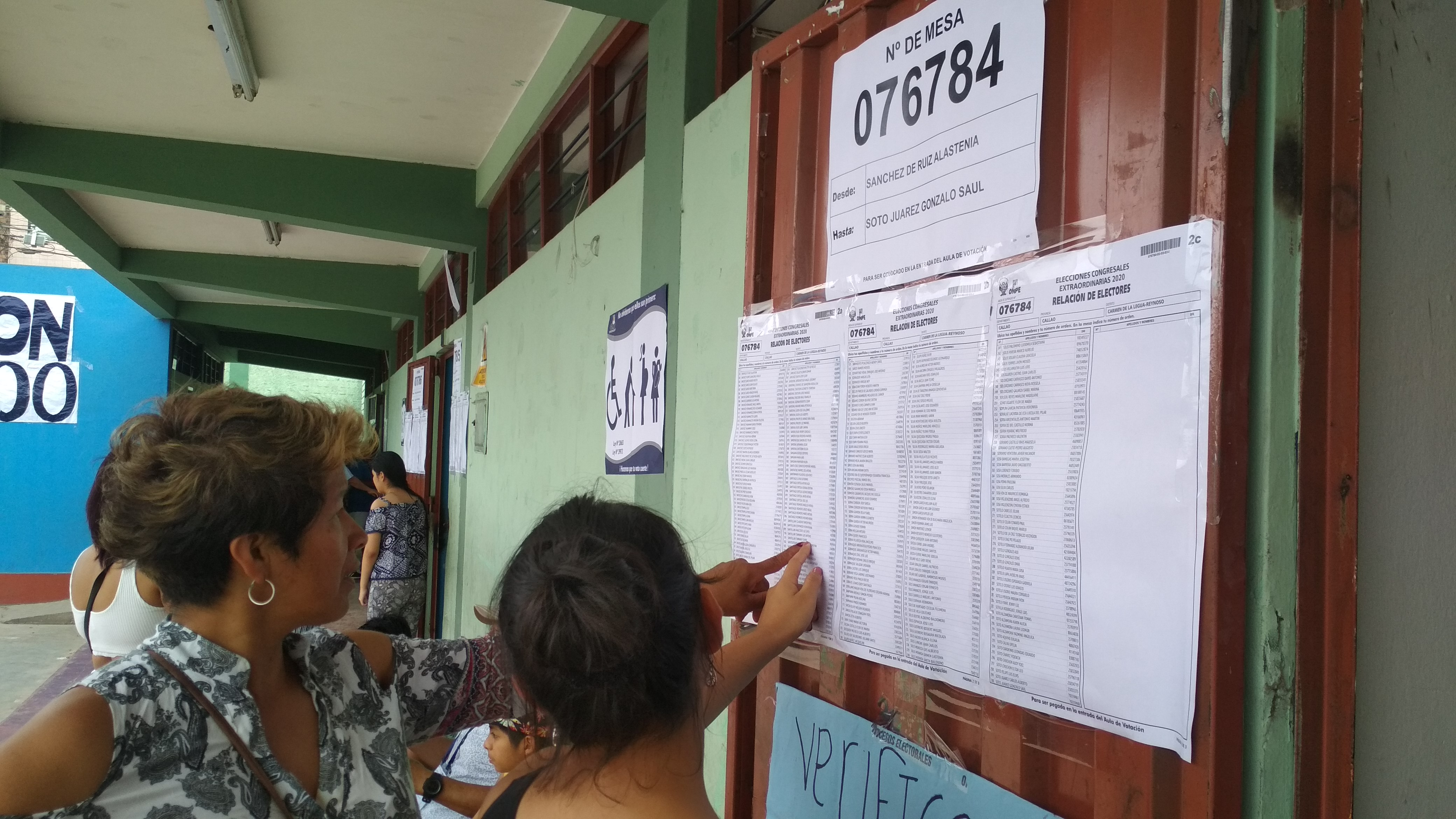 Información para electores en Augusto Salazar Bondy. Elecciones congresales extraordinarias de Perú de 2020